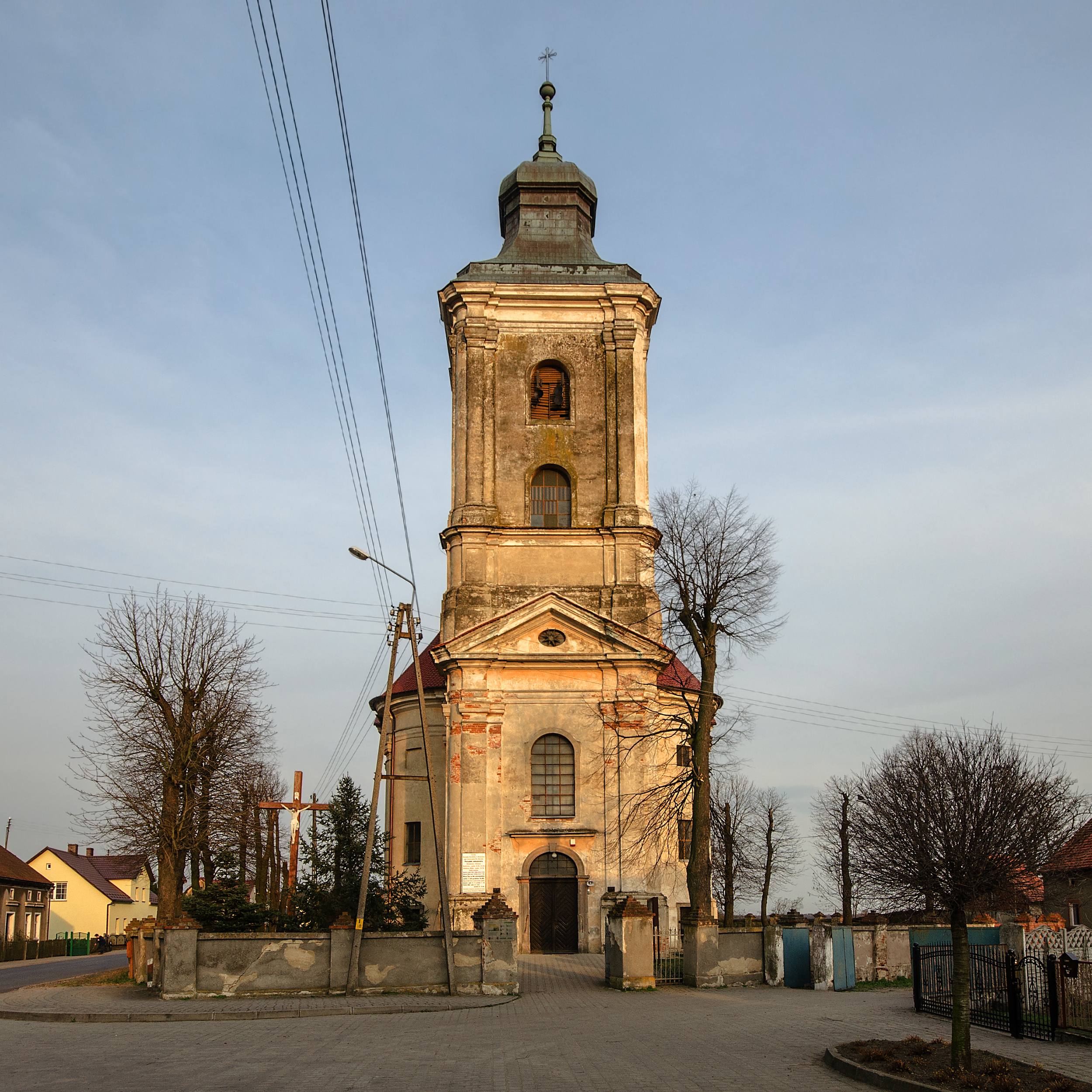 Barkowo, kościół par. p.w. św. Marcina, XVIII